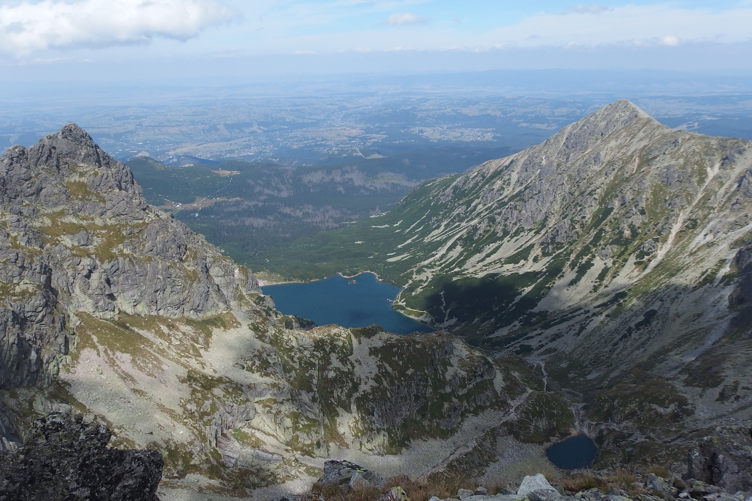 Widok na Czarny Staw Gąsienicowy (w oddali) i Zmarzły Staw Gąsienicowy (bliżej) z Orlej Perci, niedaleko Przełęczy Zawrat